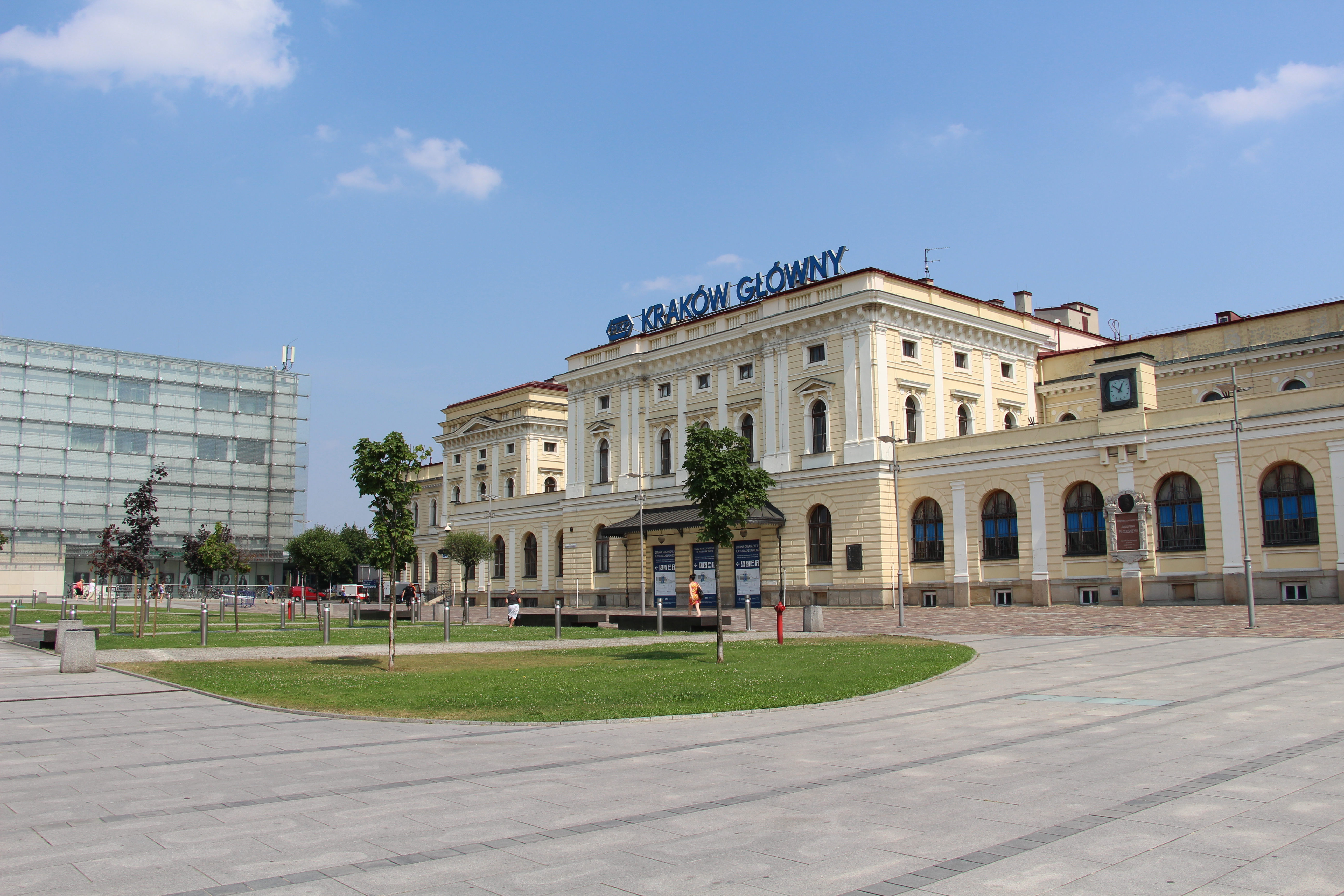 Plac Jana Nowaka Jeziorańskiego Krakow railway station. Arch. Peter Rosenbaum 1844-47